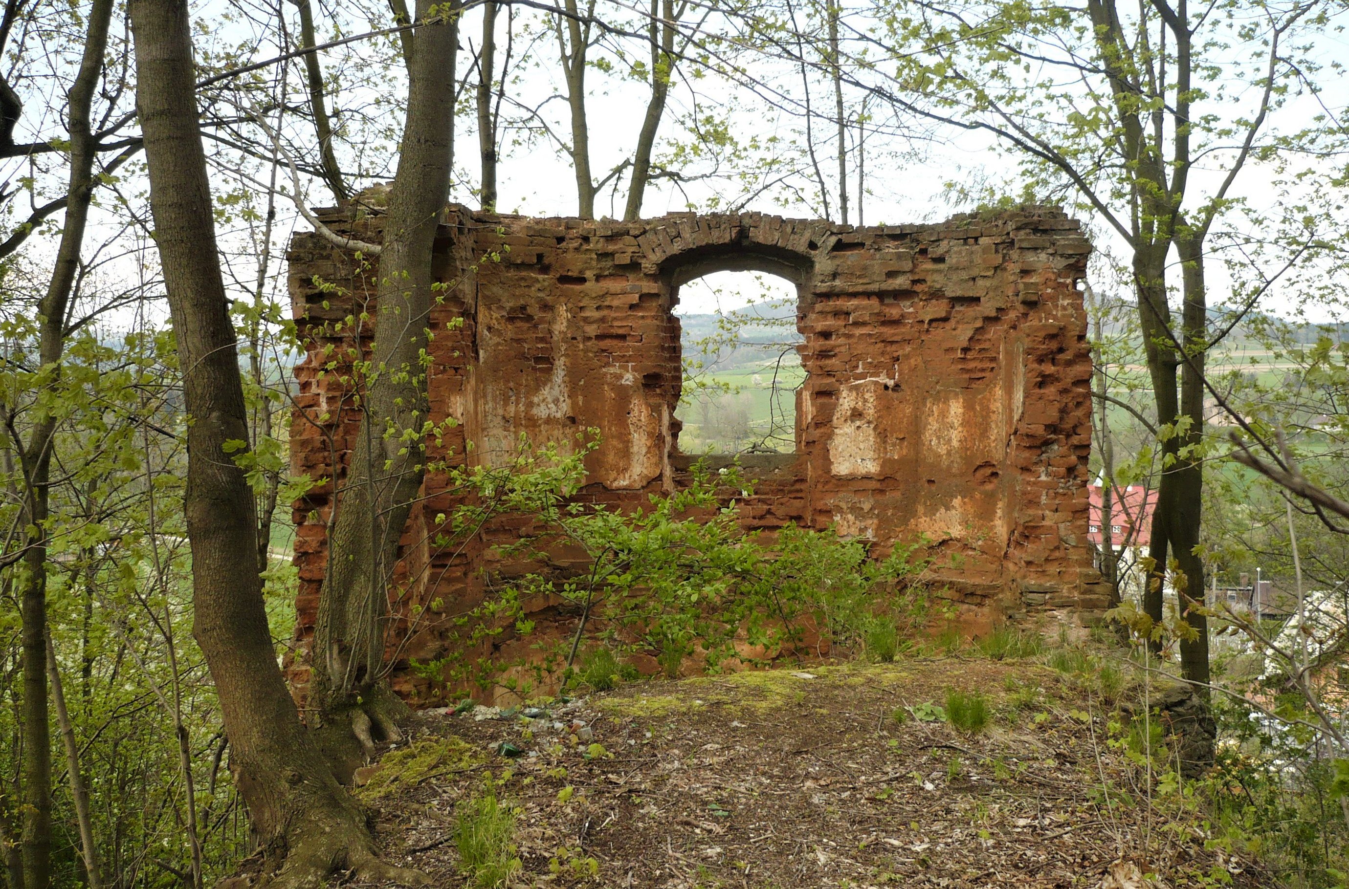 Oranzeria w Piszkowicach